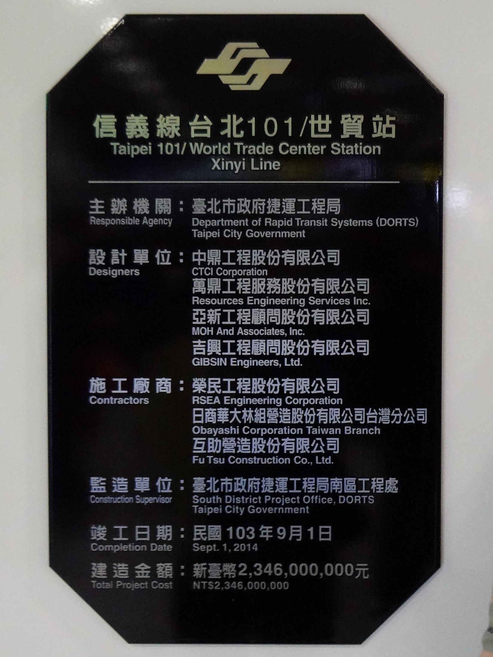 臺北捷運信義線台北101/世貿站竣工紀念牌。